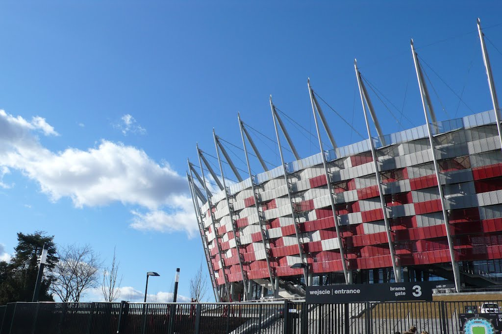 Stadio Nazionale di Varsavia